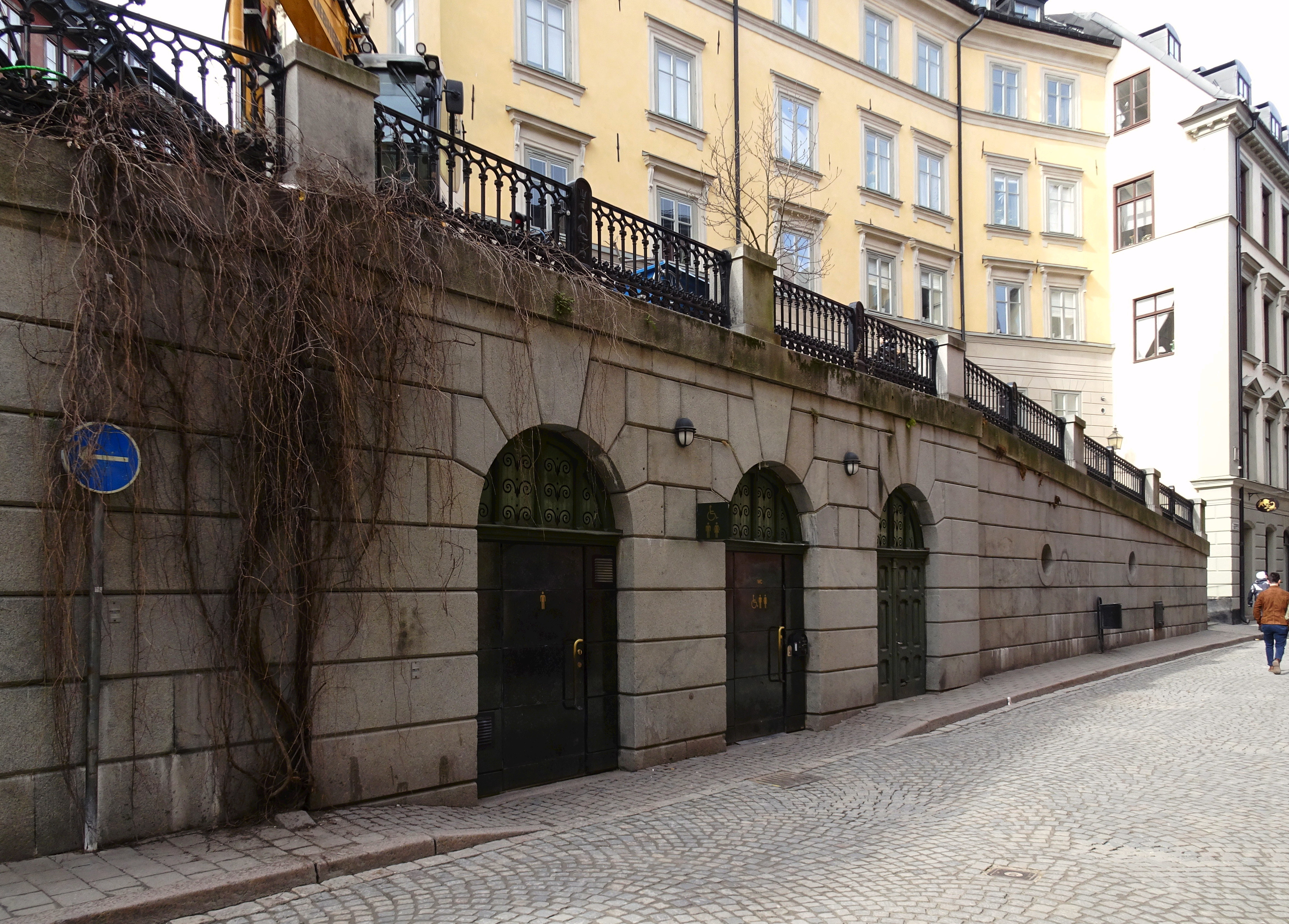 Offentlig toalett vid Österlånggatan